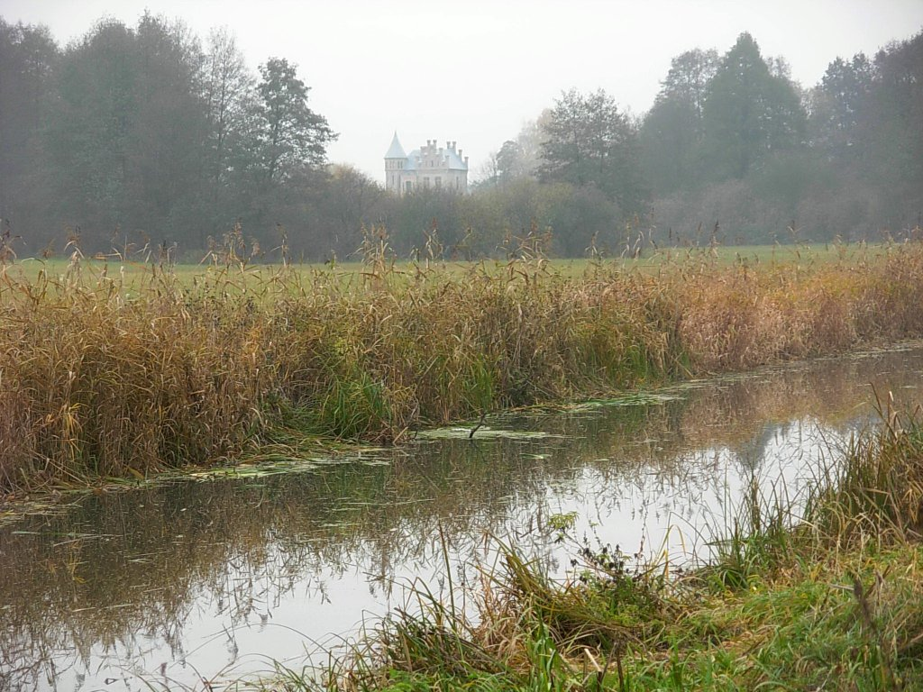 Dawny pałacyk myśliwski Skórzewskich nad Kanałem Noteckim w pobliżu rezerwatu przyrody Dziki Ostrów